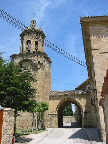 Date du cliché : septembre 2001.